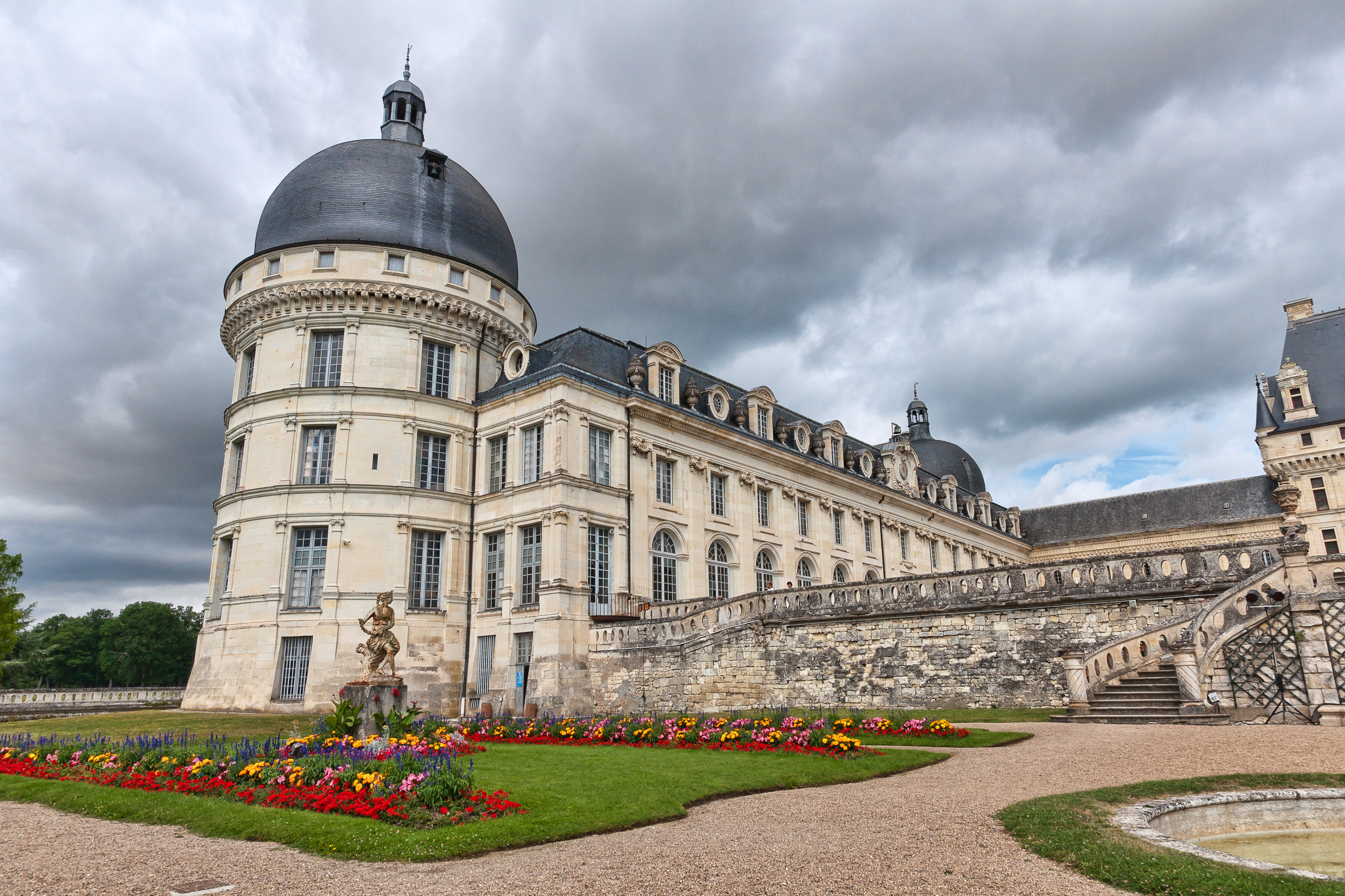 Château de Valençay. Tour principale.